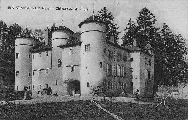 Chateau de Montfort - Eyzin-Pinet, Isère, Rhône-Alpes, France.